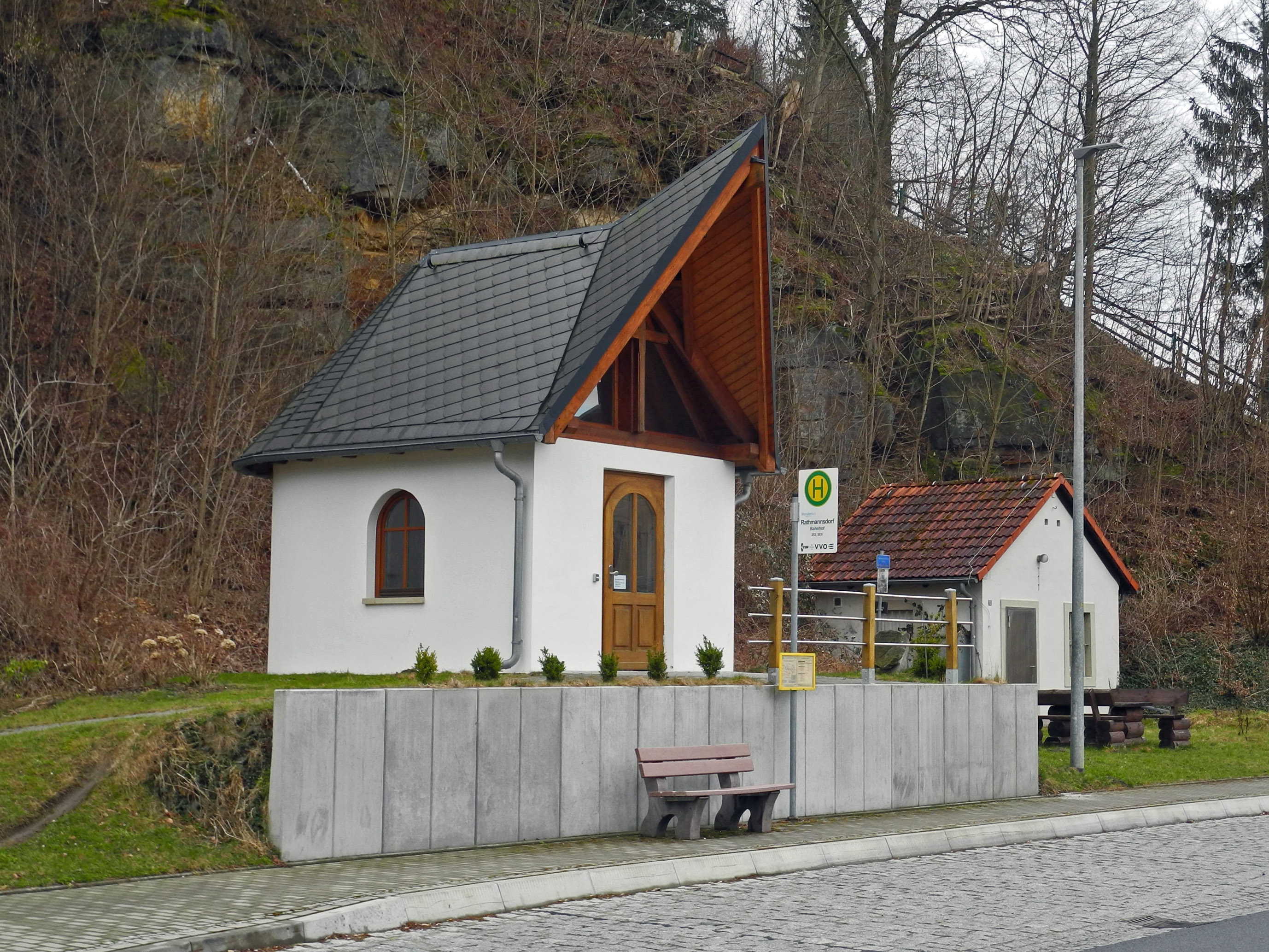 Ökumenische Gedächtniskapelle (2012) in Rathmannsdorf, Hohnsteiner Str.